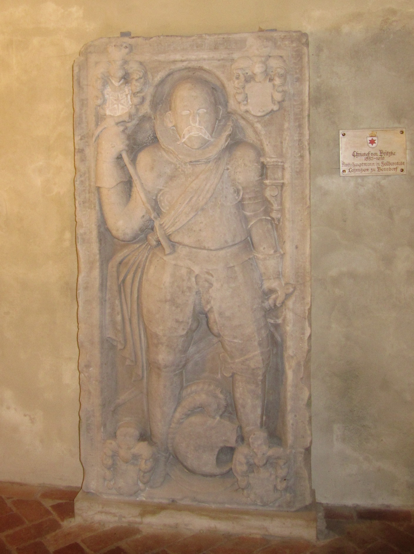 Grabplatte Christof von Britzke in der Dorfkirche Wusterwitz, Künstler unbekannt